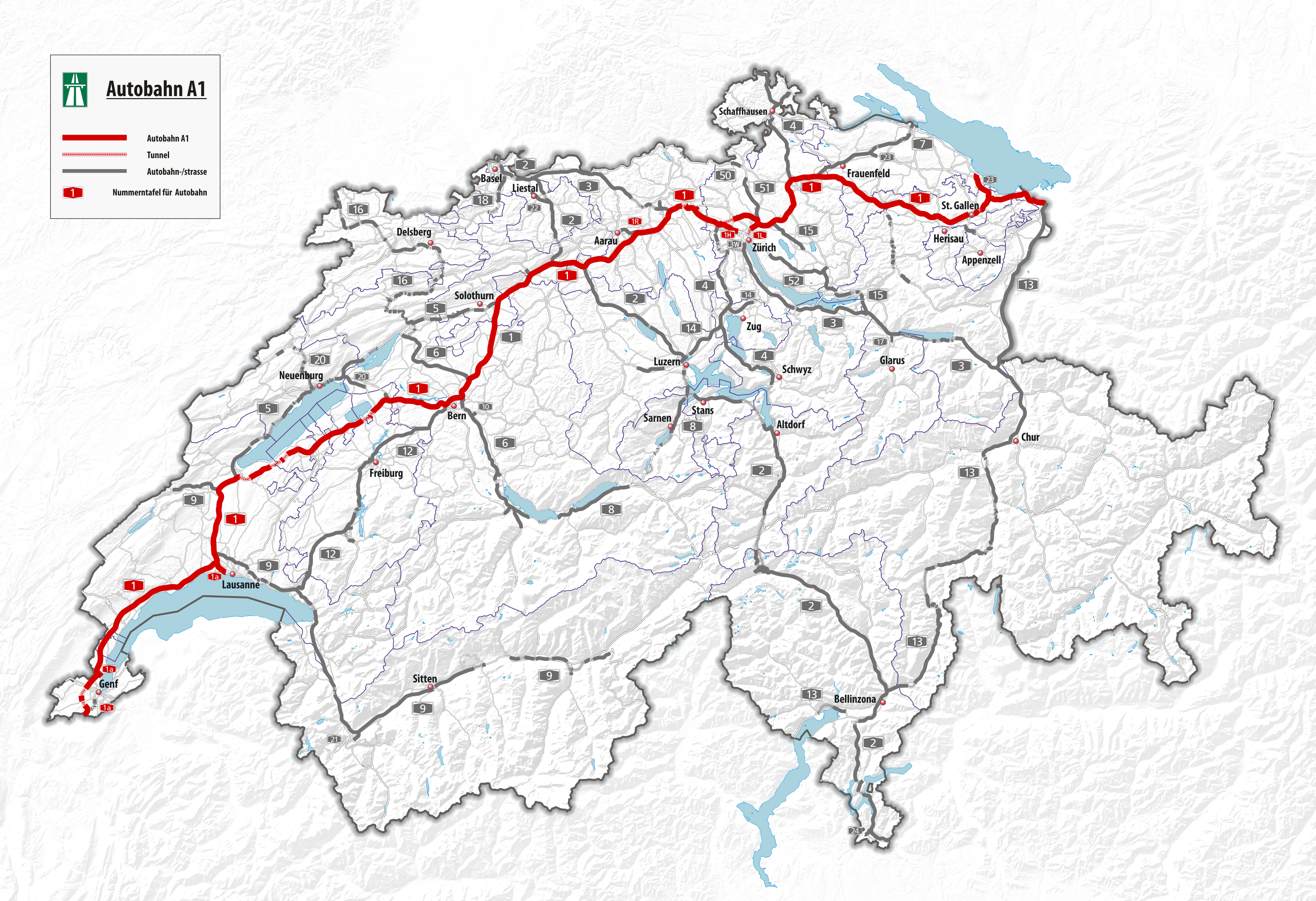 Autobahn A1 Stand 2018